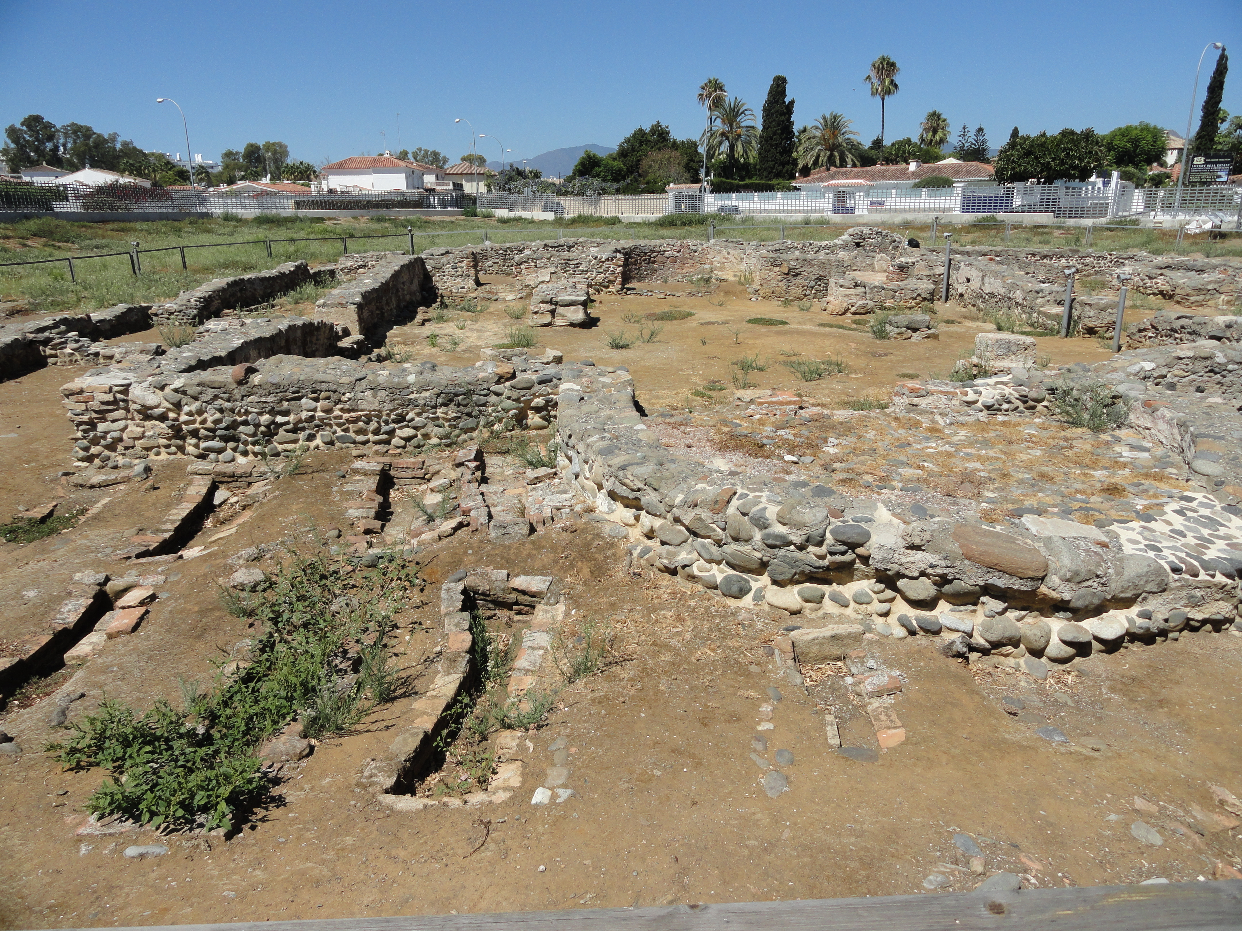 Basílica Paleocristiana de Vega del Mar